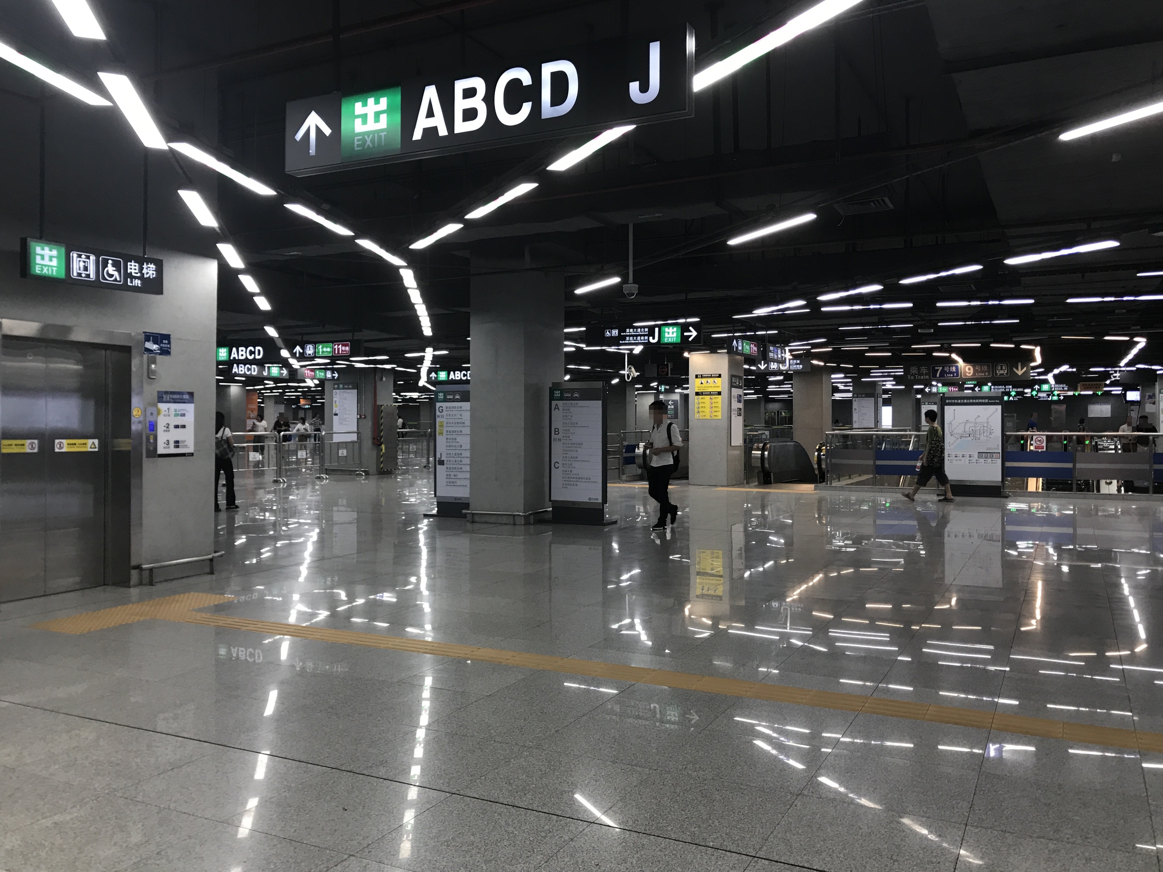 車公廟駅構内